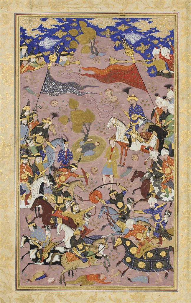 Şah İsmayıl və Ağqoyunlu Sultan Murad arasında döyüş (1503)